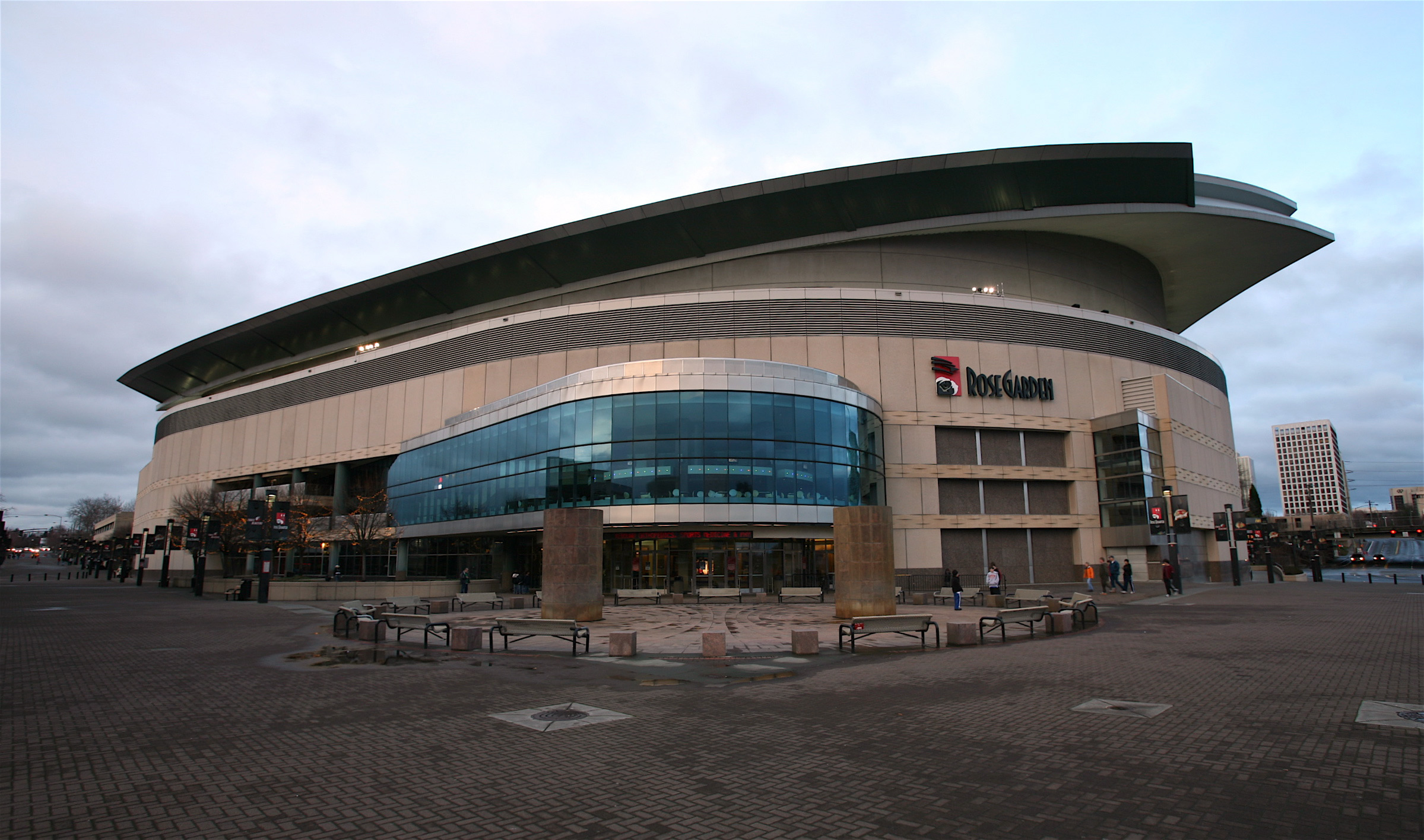 Moda Center in Portland, Oregon.